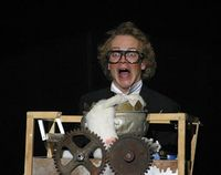 Markus Zink auf der Bühne